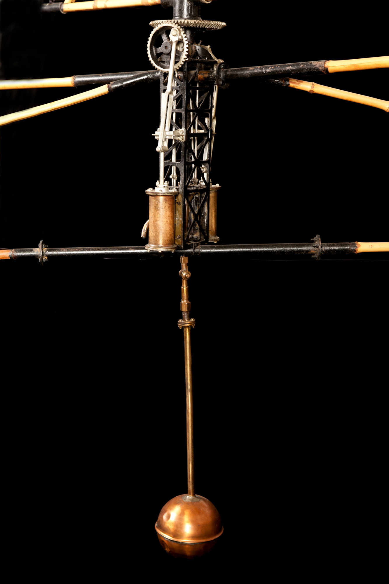 Elicottero sperimentale Enrico Forlanini. Modello esposto al Museo nazionale della scienza e della tecnologia Leonardo da Vinci, Milano.